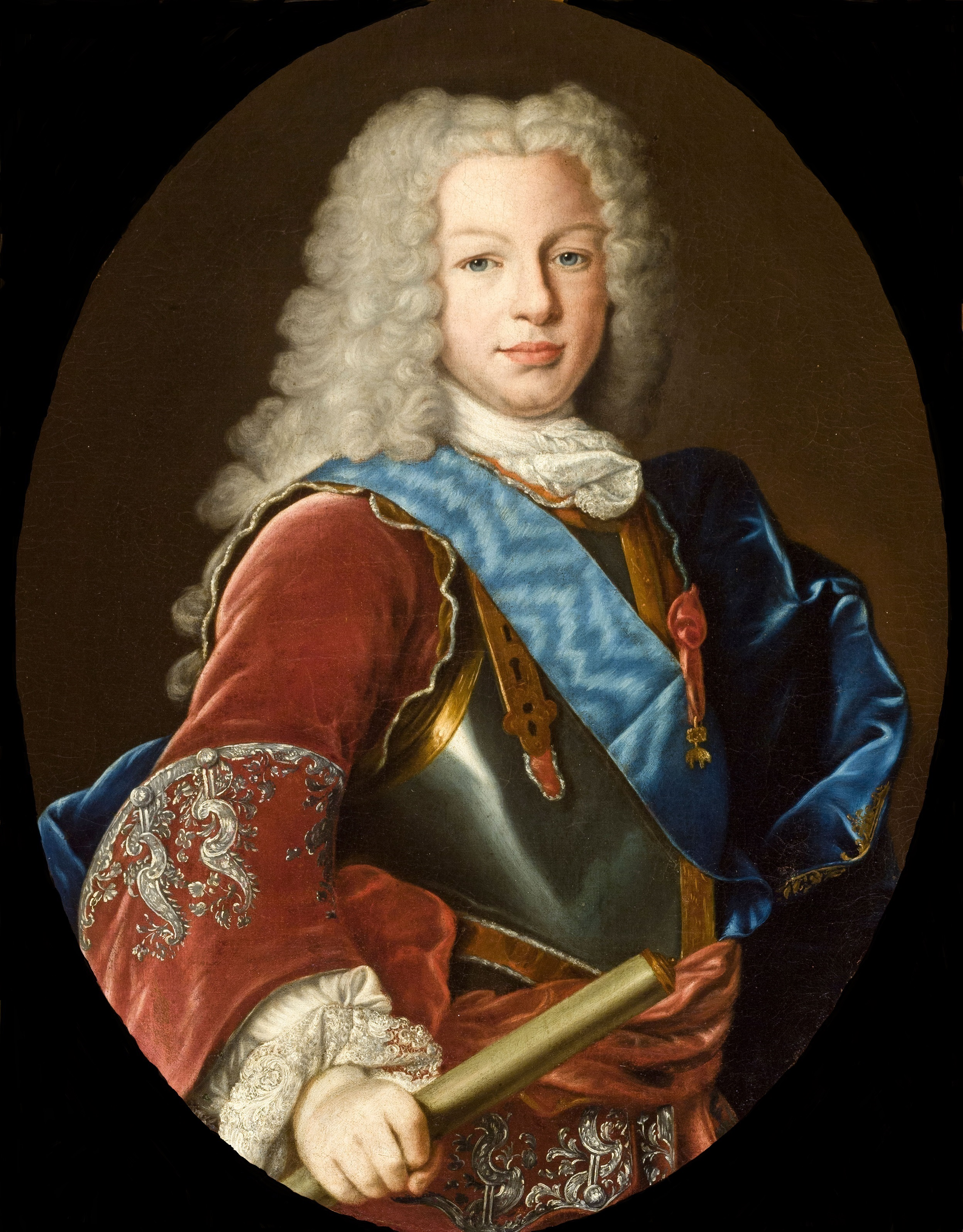 Retrato del rey Fernando VI de España (1713-1759), que fue hijo del rey Felipe V de España y de la reina María Luisa Gabriela de Saboya.